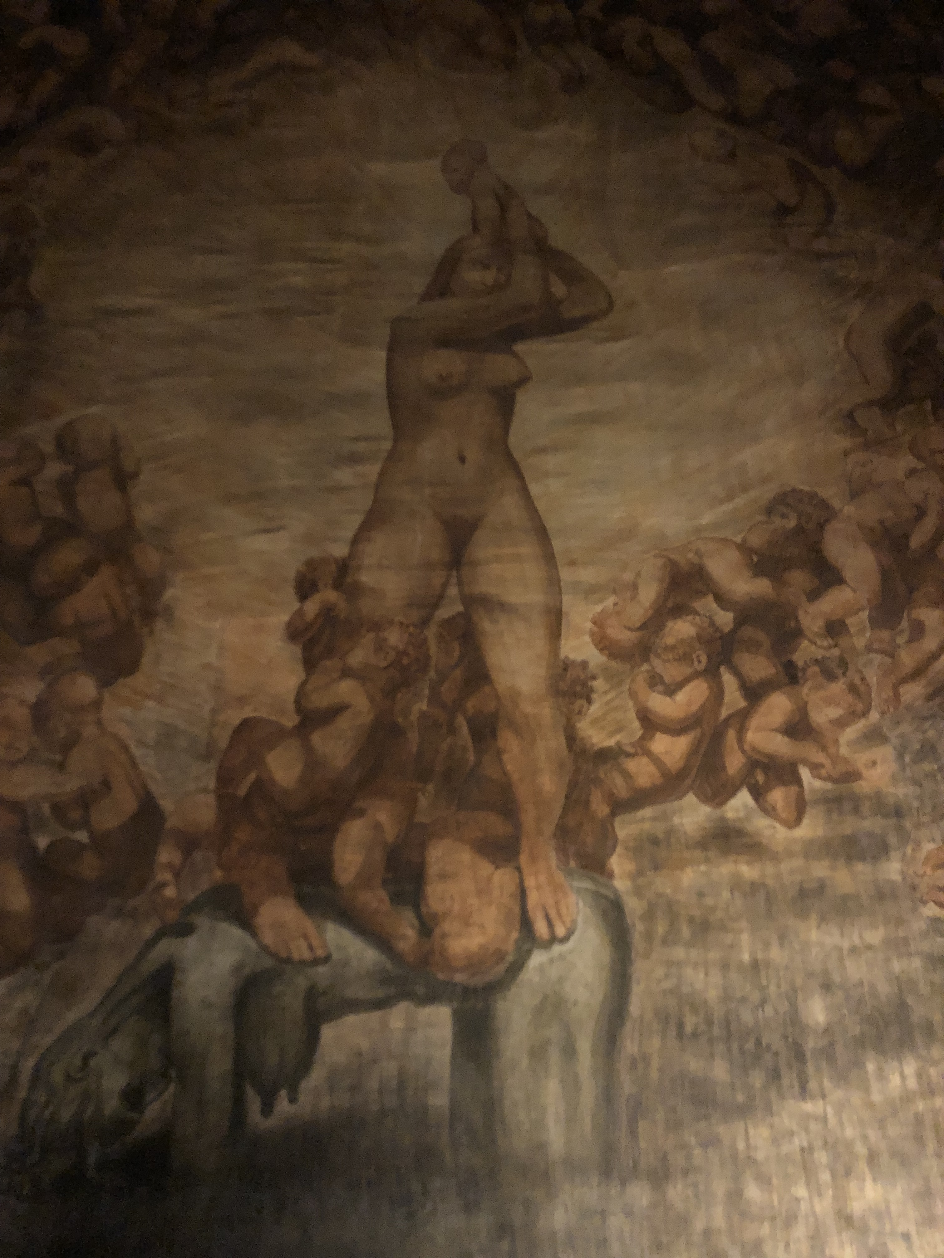 Emanuel Vigelands Museum